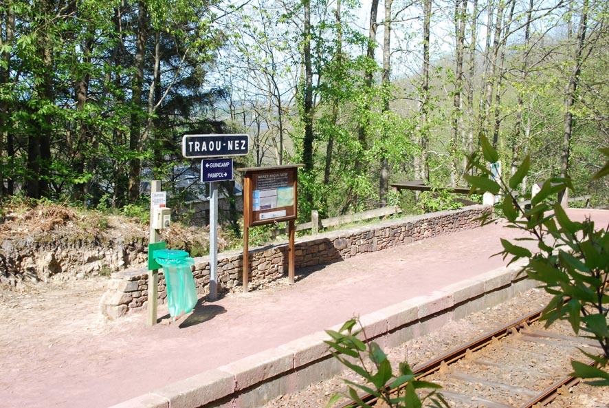 Ti-gar Traou-nez.